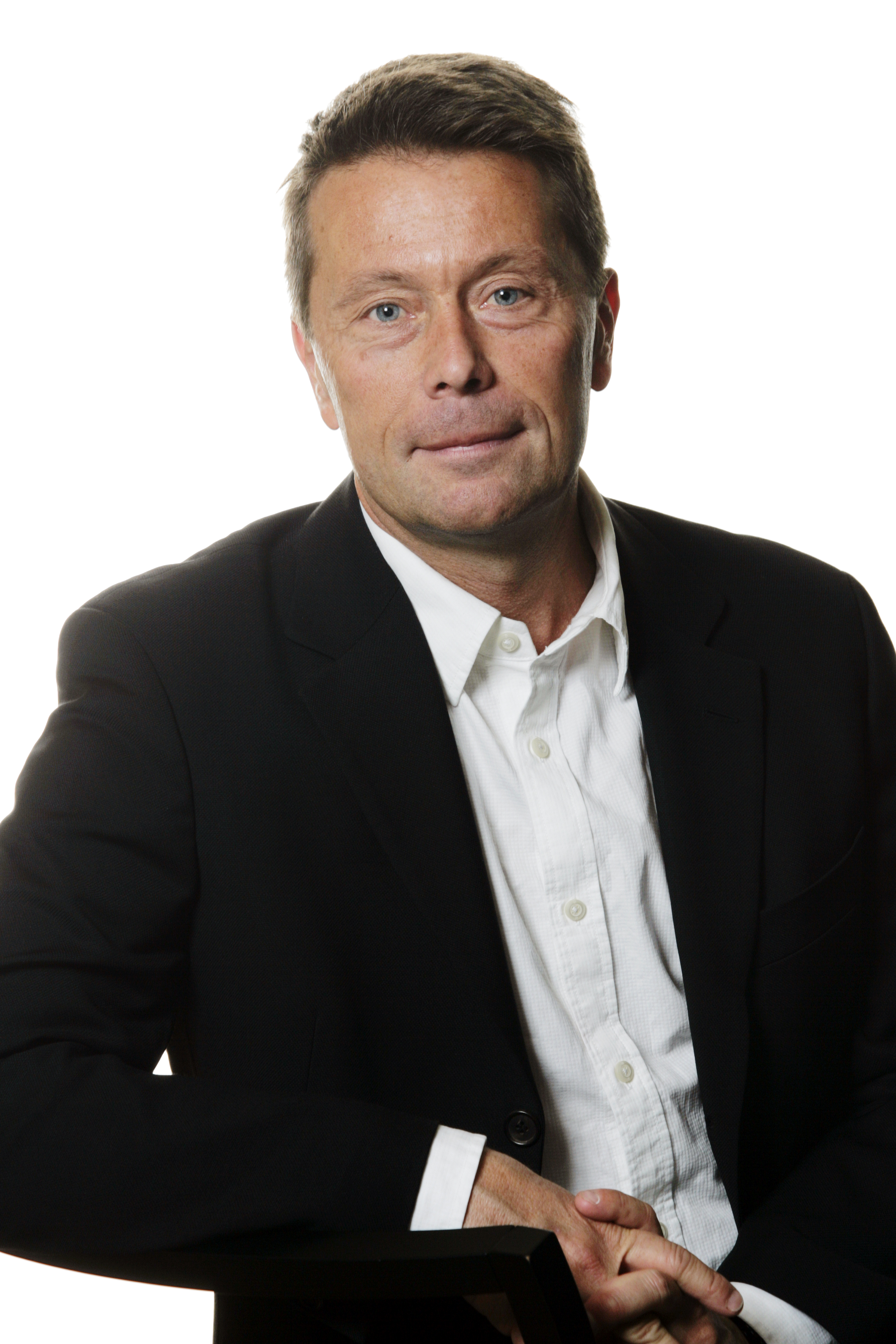 Tomas Brunegård, VD och koncernchef Stampen-gruppen